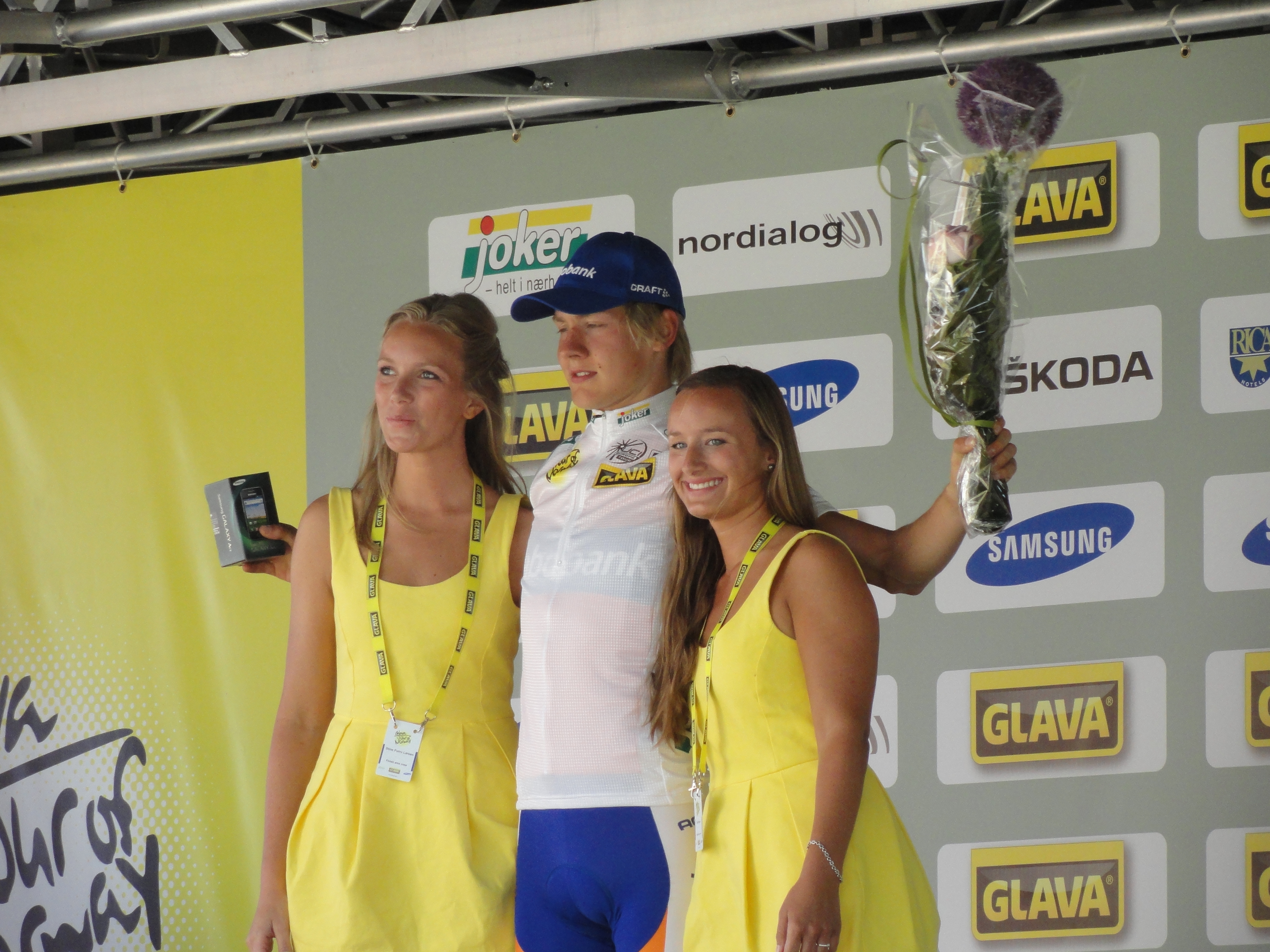 u23 ton 2011